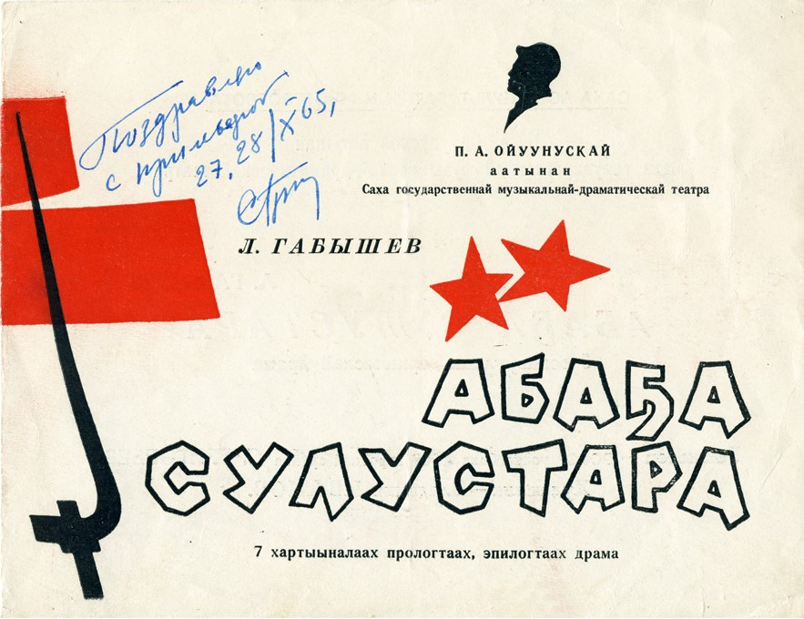 Программка к спектаклю "Звезды Абаги". ЯГМДТ, 1965 г.